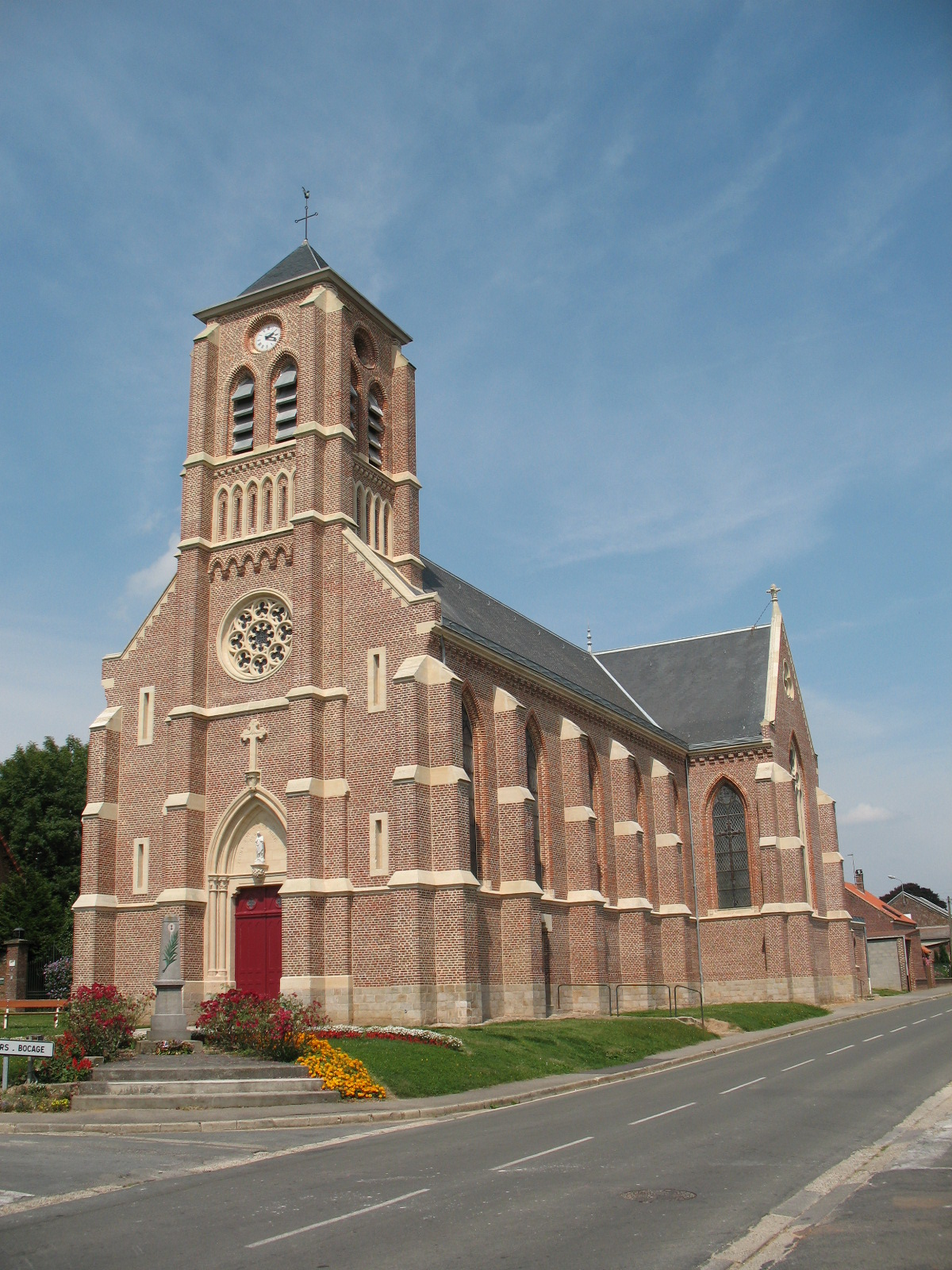 De style néo-gothique, l'église a été construite en 1862. La flèche du clocher a été remplacée en 1968 par une couverture plus courte.